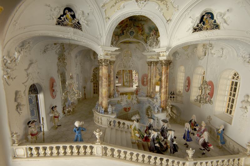 Im Treppenhaus von Schloss Perenz: König Talari und Gefolge, Eine Szene in Schloss Perenz, Die Schlösser der Gepriesenen Insel, Rococo en miniature, Gerhard Bätz und Manfred Kiedorf